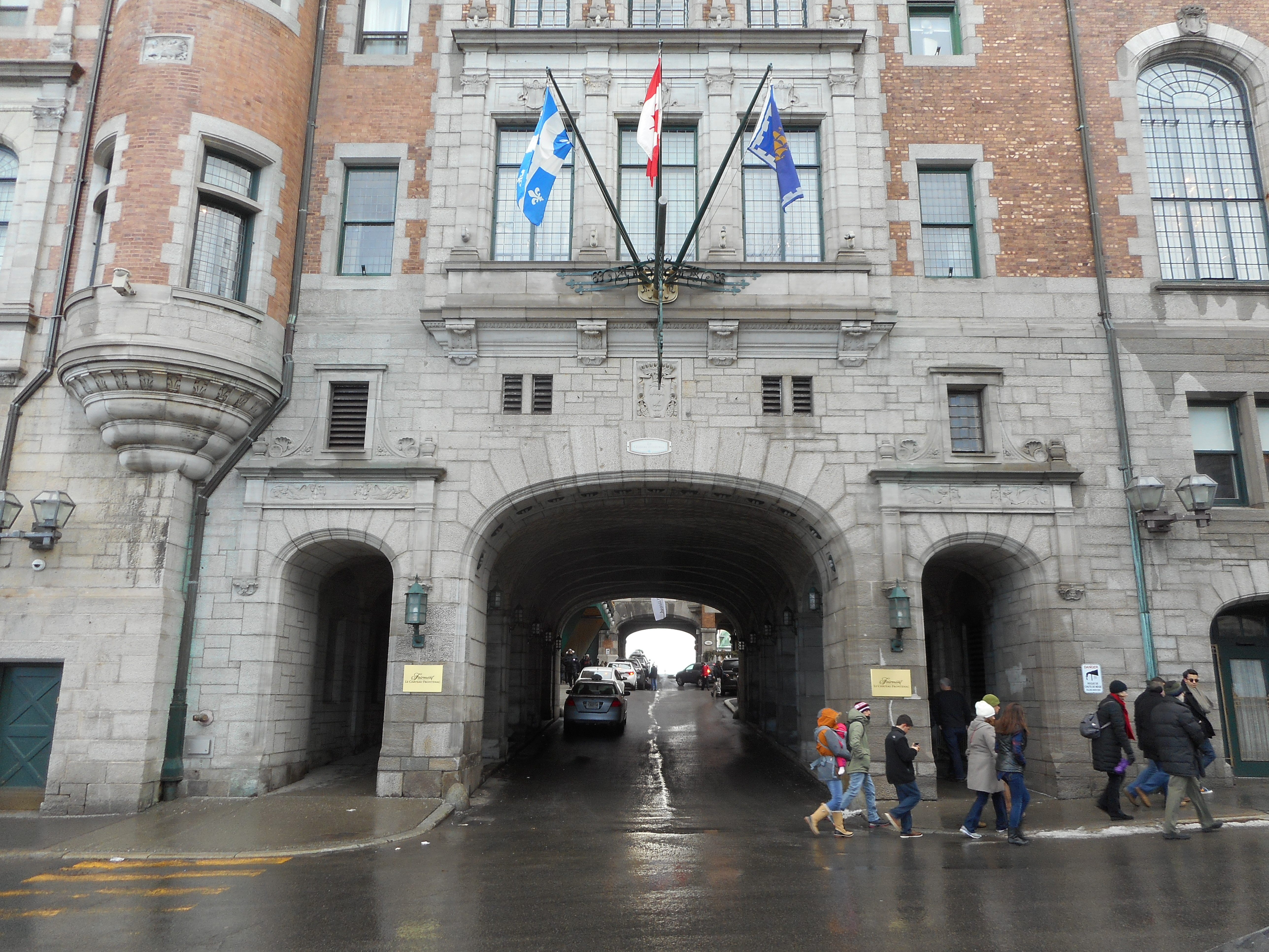 Le Château Frontenac, depuis la rue Saint-Louis, entrée par la rue des Carrière, Québec